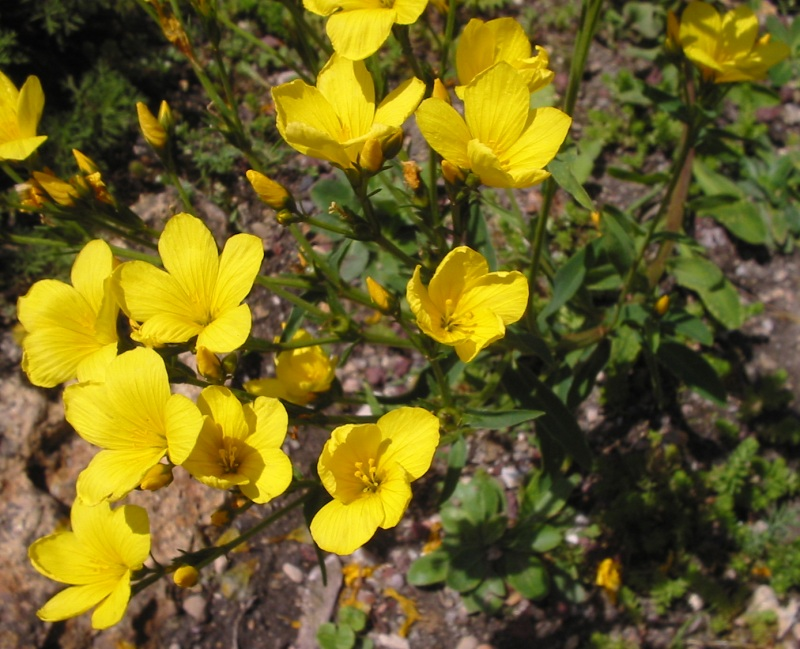 Linum dolomiticum, Jardin alpin, Jardin des Plantes de Paris